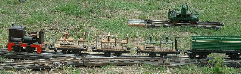 Kemencei Kisvasút, modellvasút a 2003-as kisvasúti napon